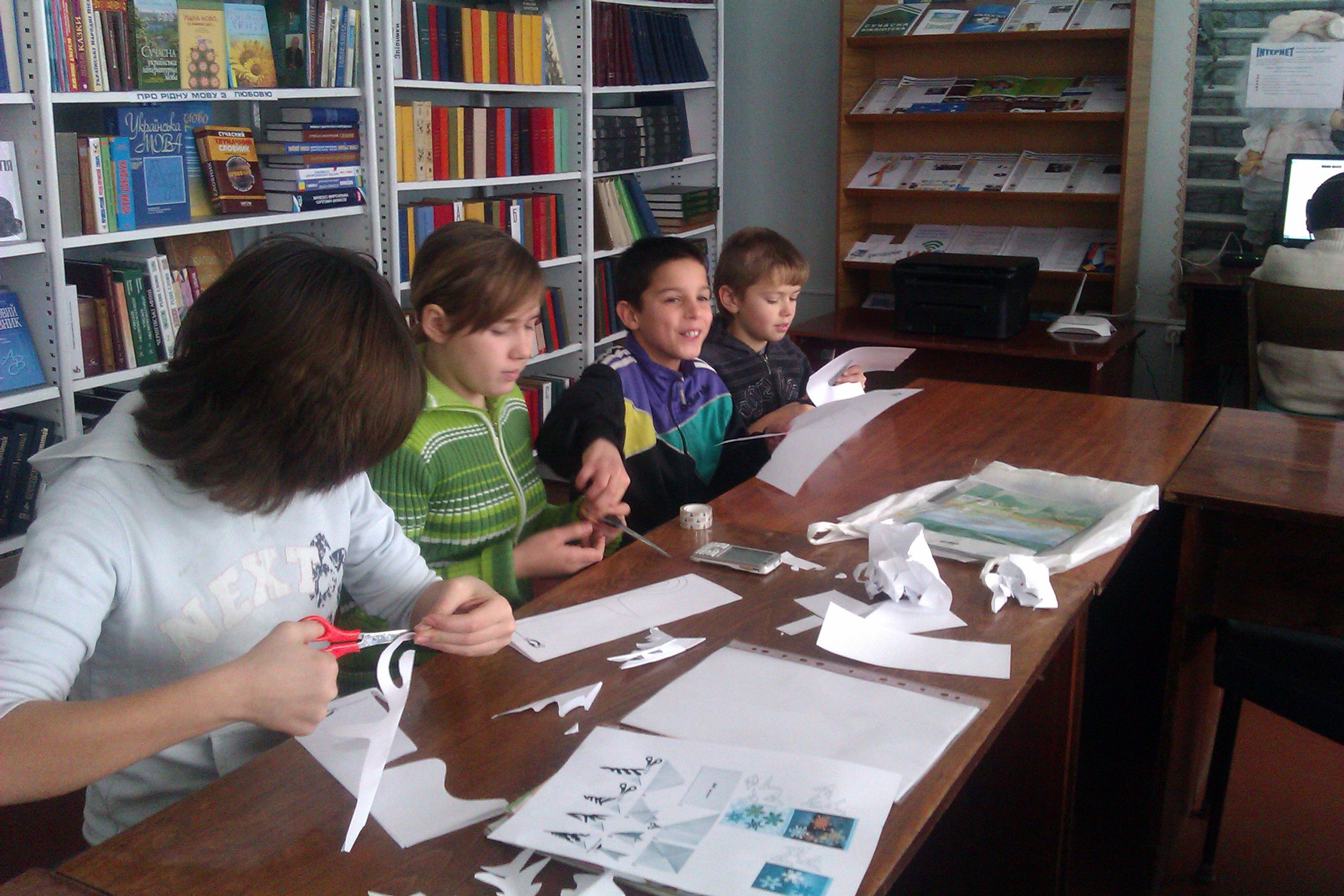 Новорічні свята